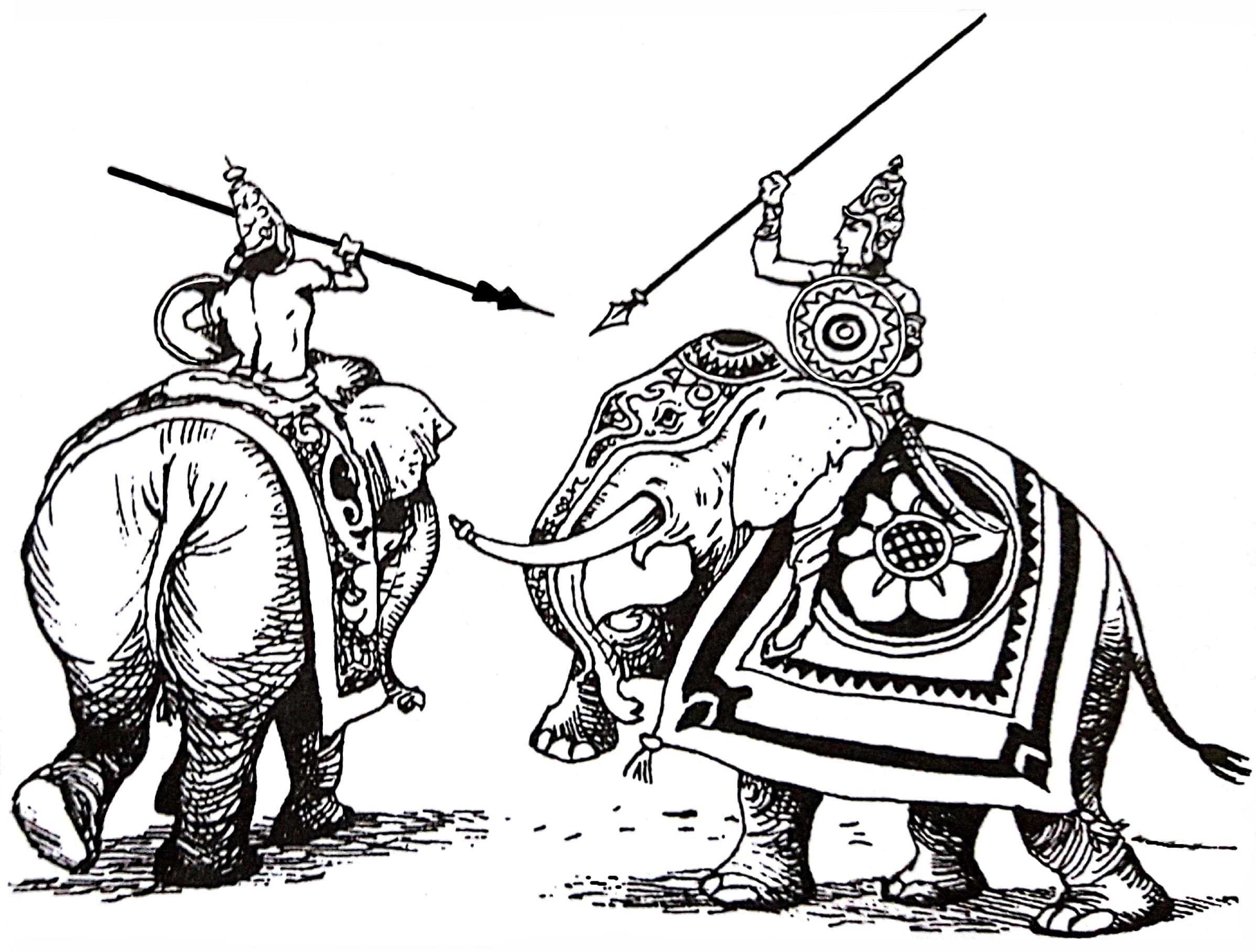 සිංහල: king Dutugemunu and King Elara Duel combat